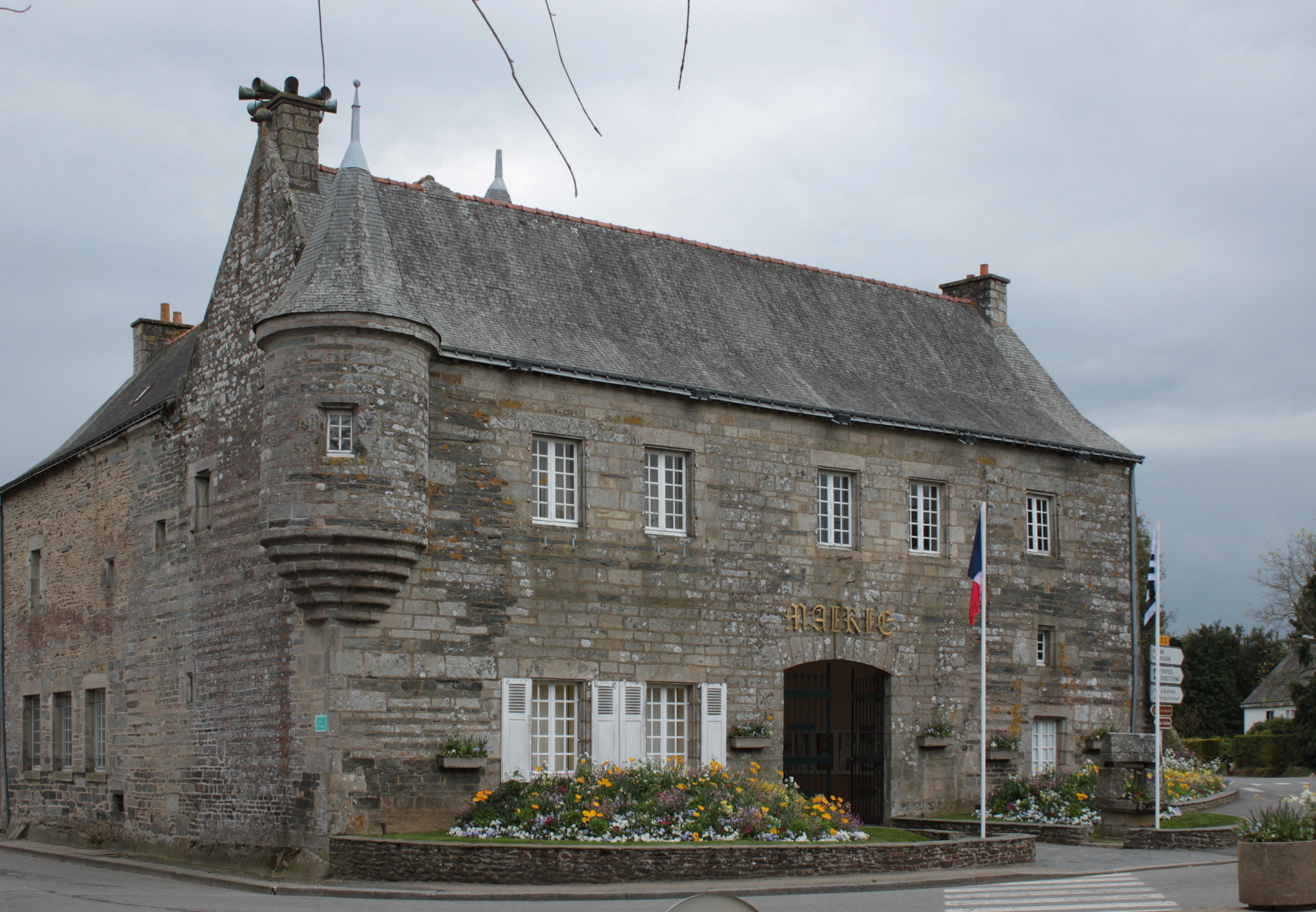 Mairie, ancienne maison-forte, Fr-56-Noyal-Pontivy.